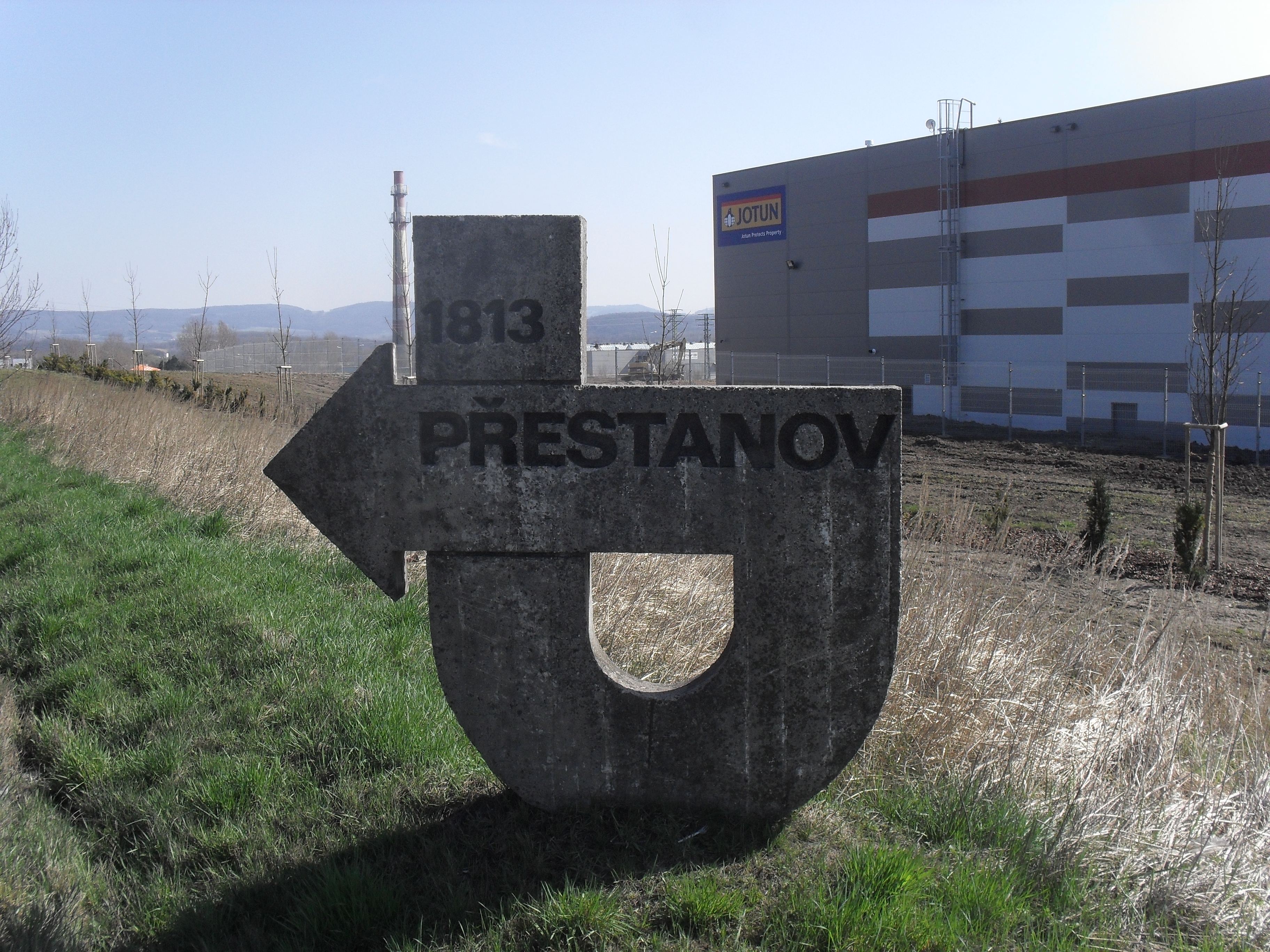 Fabrika Norského koncernu JOTUN u Přestanova.